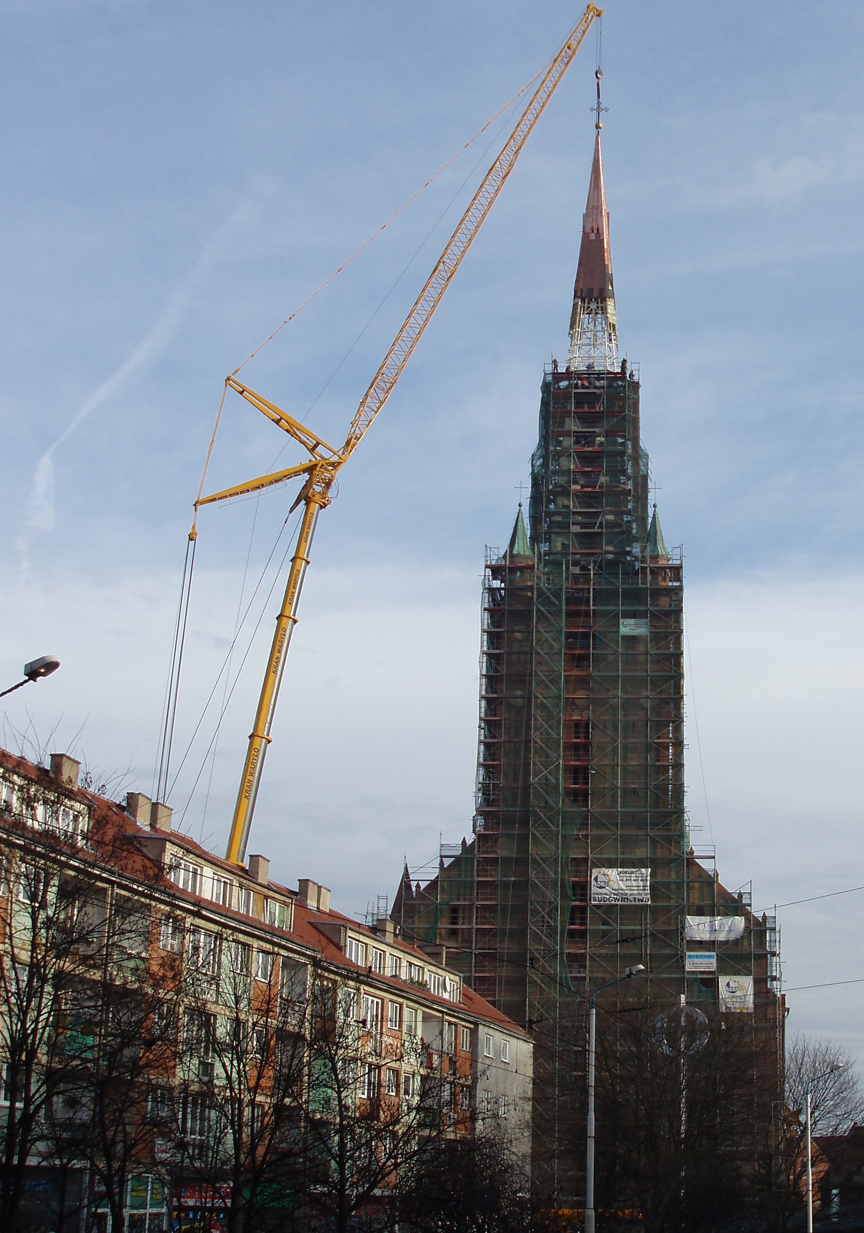 Katedra szczecińska podczas rekonstrukcji wieży